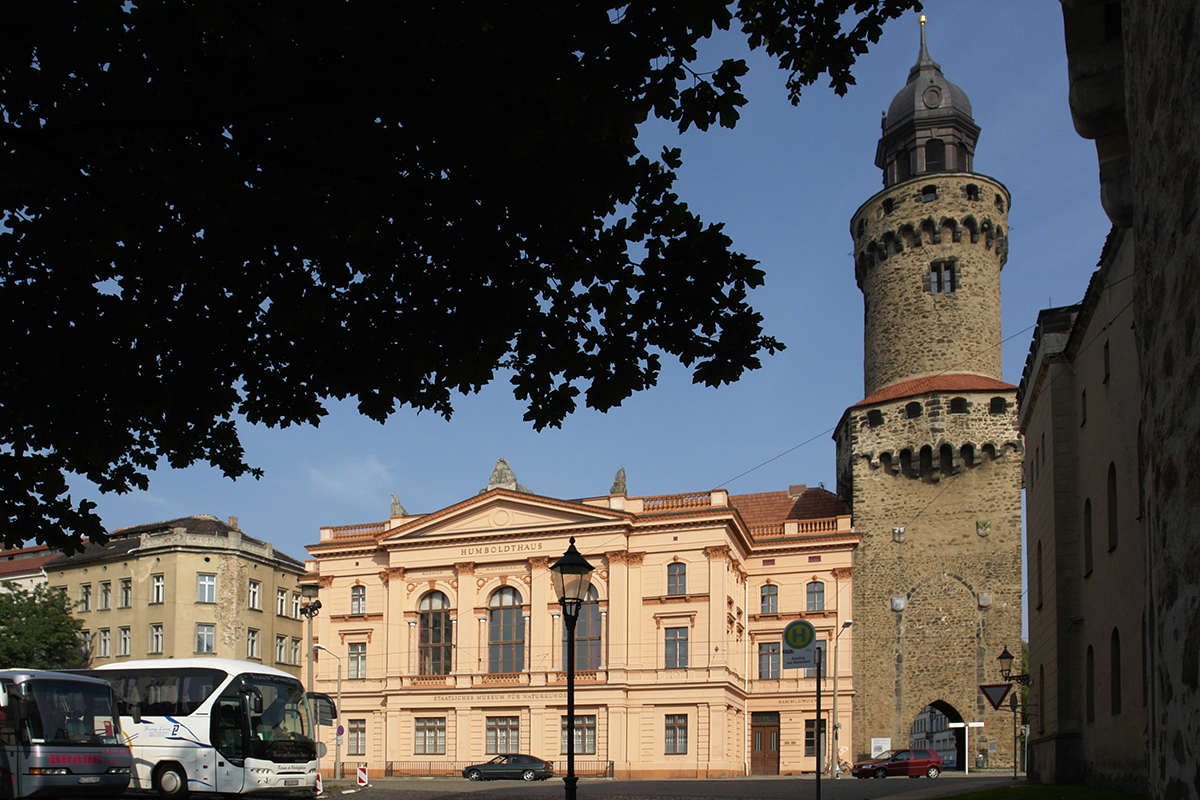 Reichenbacherturm